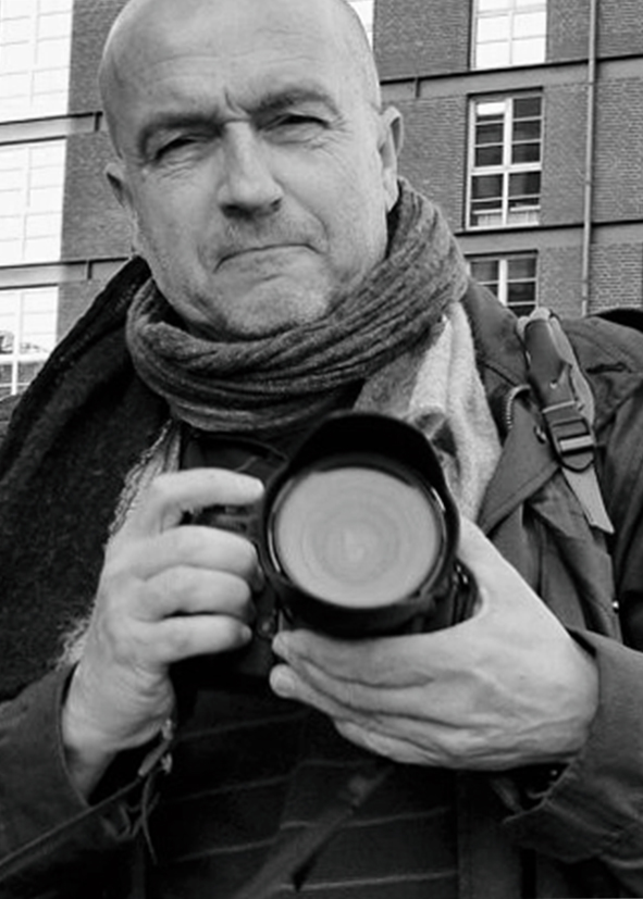 Portrait Amos Schliack